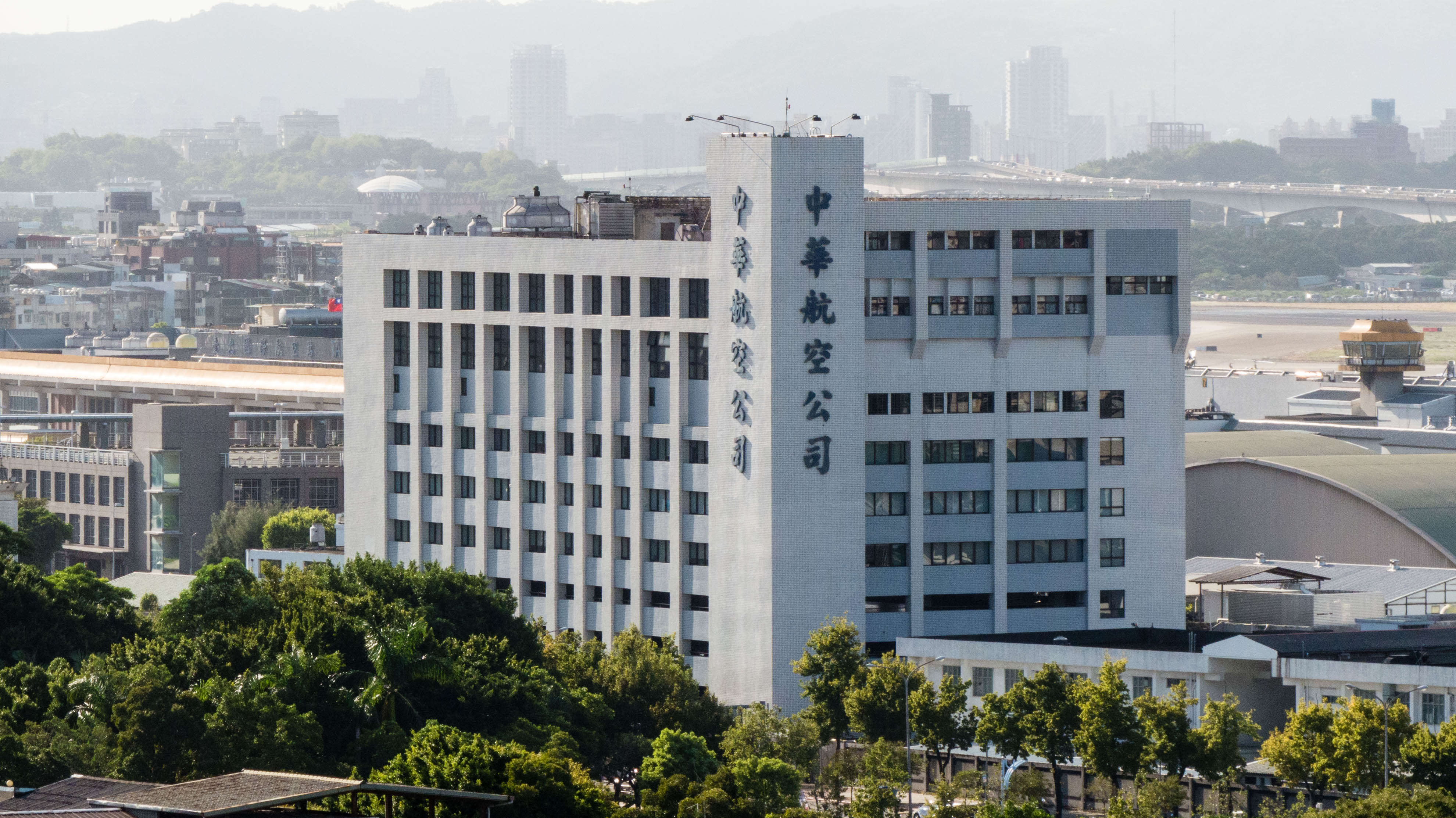 中文（台灣）: 從臺北市民生社區活動中心西北遠眺中華航空民權大樓（中華航空松山航訓區、華信航空總部）。